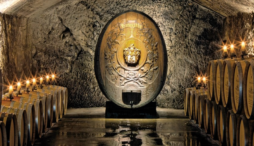 A Haraszthy Ágoston által alapított borászat mai napig logójaként használja az ősi címert.